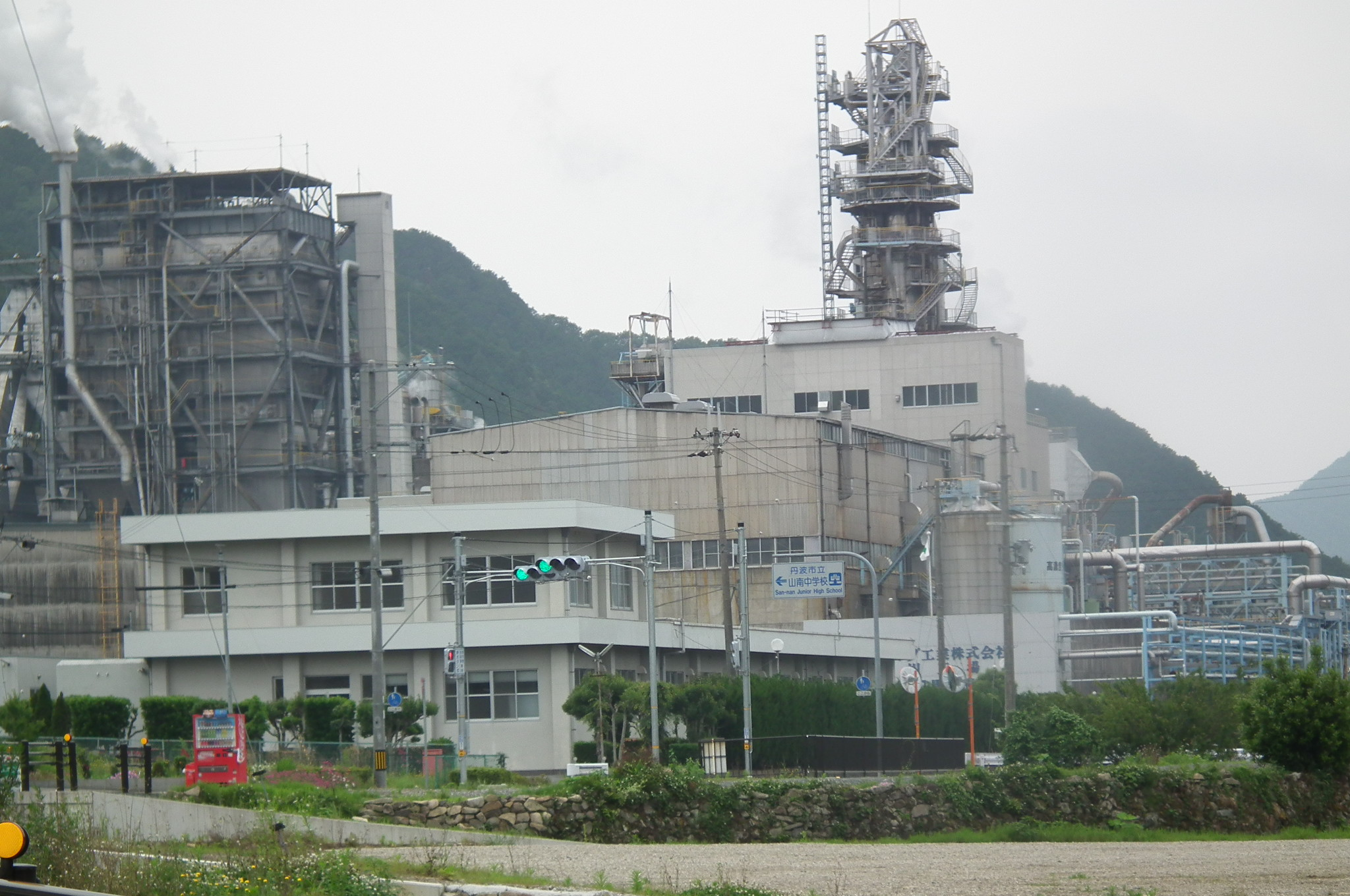 HYOGO PULP 兵庫パルプ